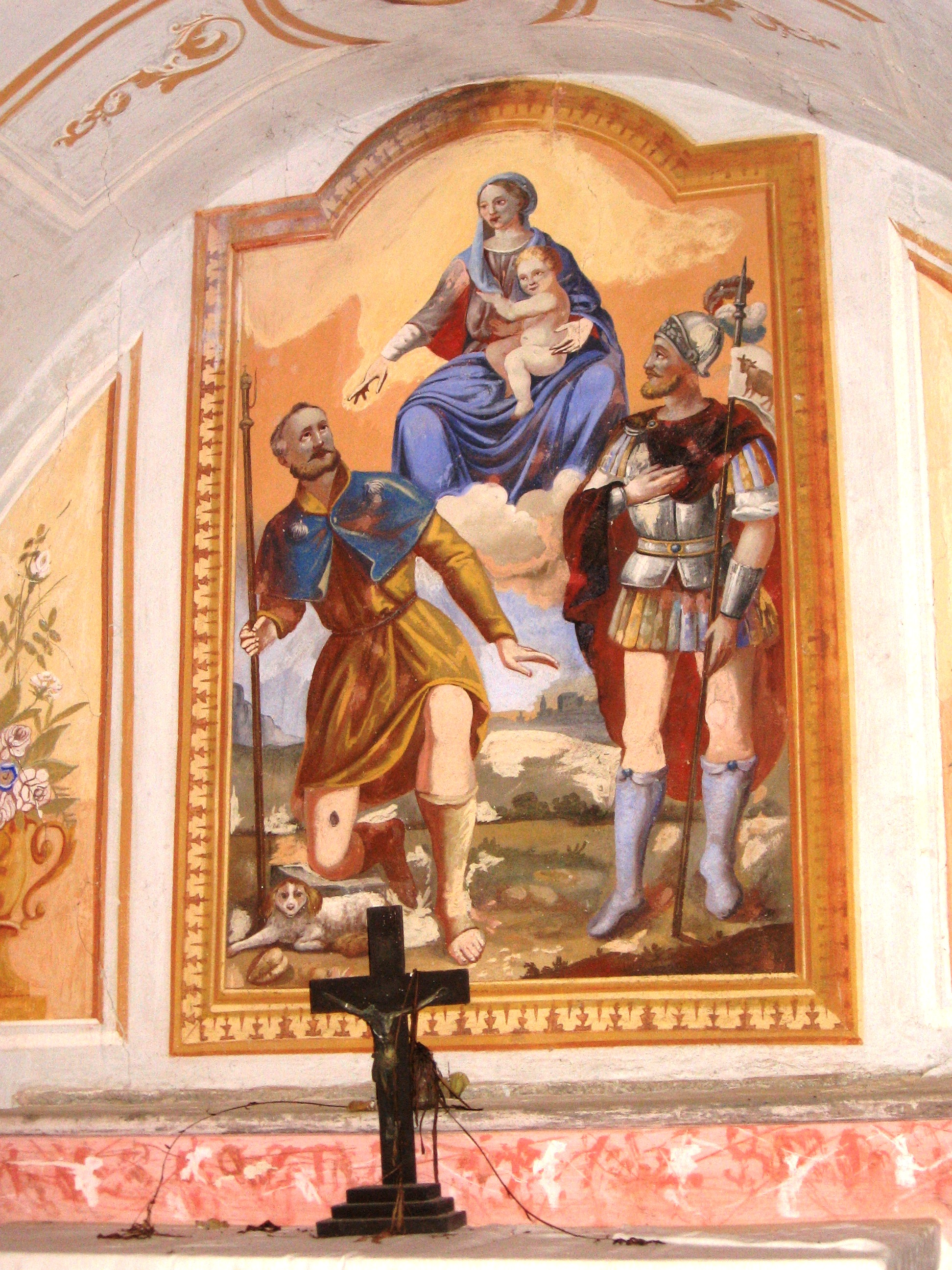 Pezzolo Valle Uzzone. Gorrino/Piovero. Cappella campestre di San Rocco, sec. XVII. La Vergine con San Rocco, a sin. e San Bovo, a ds. Sullo sfondo (forse) il borgo di Gorrino visto da est.